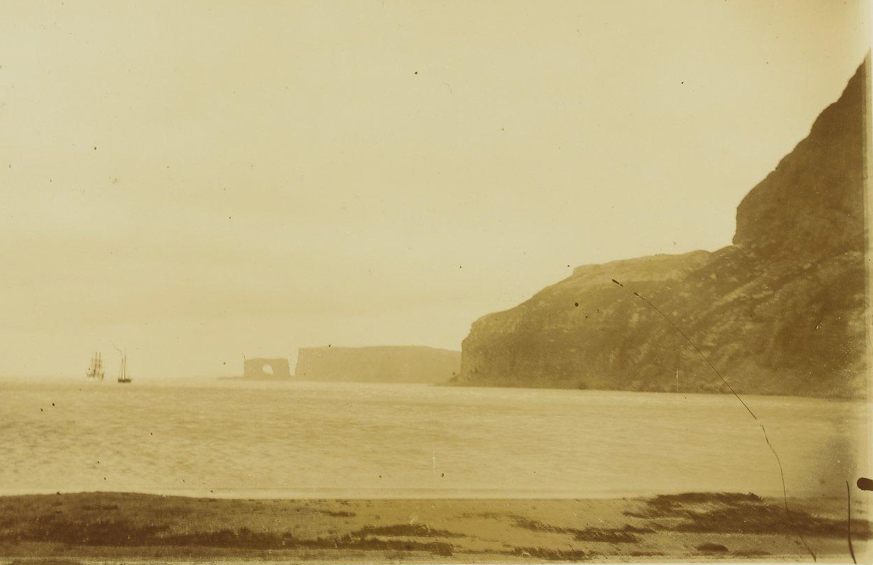 Port-Christmas (île Kerguelen) le 2 janvier 1893. L'aviso-transport française l'Eure commandée par le capitaine de frégate Lieutard et la goélette américaine Francis Allyn de John Fuller sont présent dans la baie de l'Oiseau pour le renouvellement de la prise de possession solennelle de l'archipel par la France. L'arche des Kerguelen est visible au fond de la baie.